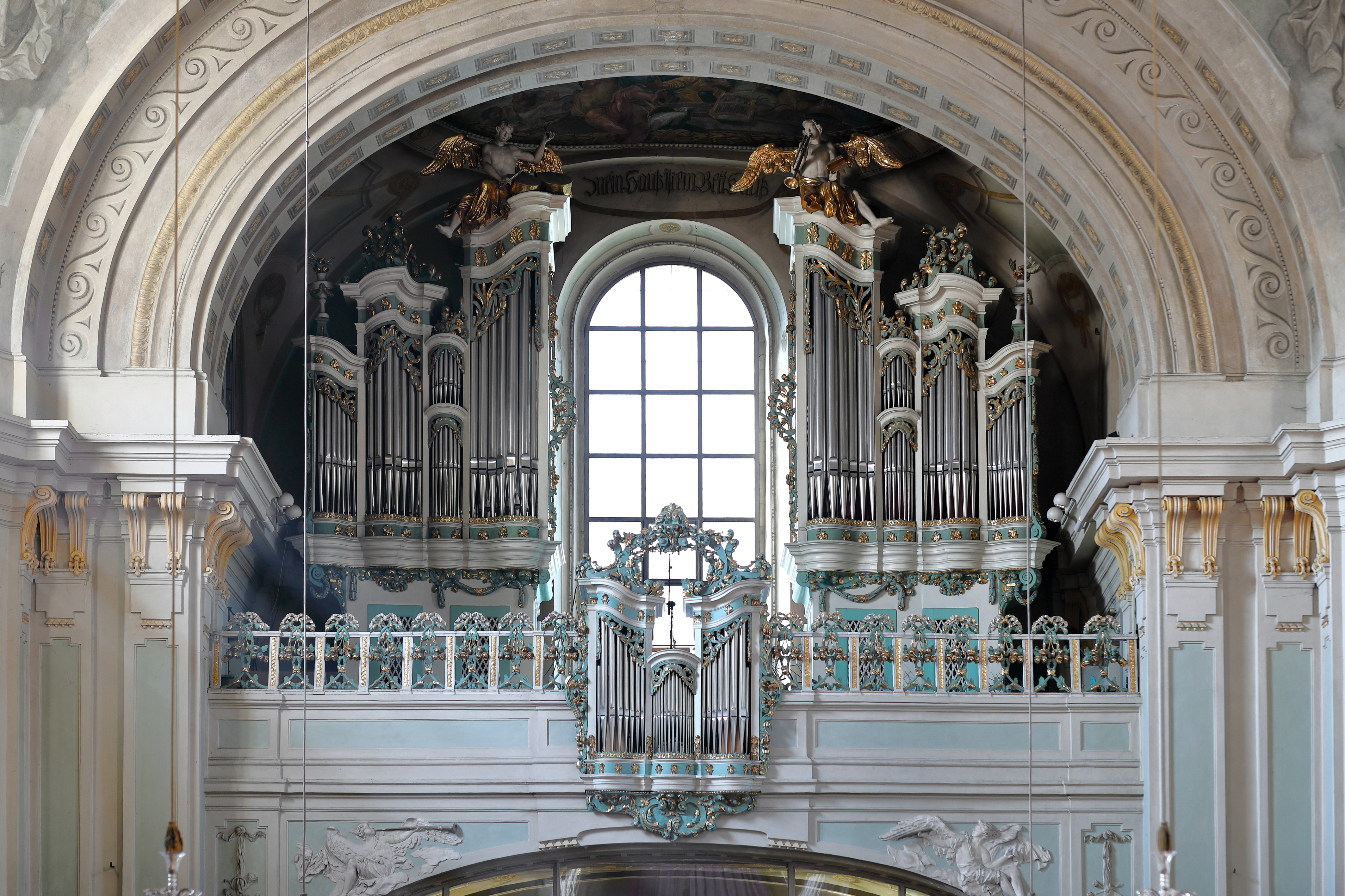 Die Orgel der Lichtentaler Pfarrkirche im 9. Wiener Gemeindebezirk Alsergrund. Die ursprüngliche Orgel mit 22 Registern auf 2 Manualen und Pedal, später Schubert-Orgel genannt, wurde 1774 von Johann Michael Panzner aus Wien gebaut. 1984 baute die Oberösterreichische Orgelbauanstalt (Orgelbau Kögler) in das alte Gehäuse ein neues Werk mit 26 Registern auf 2 Manualen und Pedal ein.